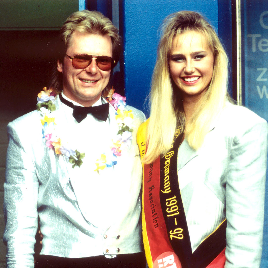 23.06.1992 - Meike Schwarz, Miss Germany, im Holiday Park Haßloch zum 10-jährigen Jubiläum der Wasserskishow mit Moderator Ralf Geryk.